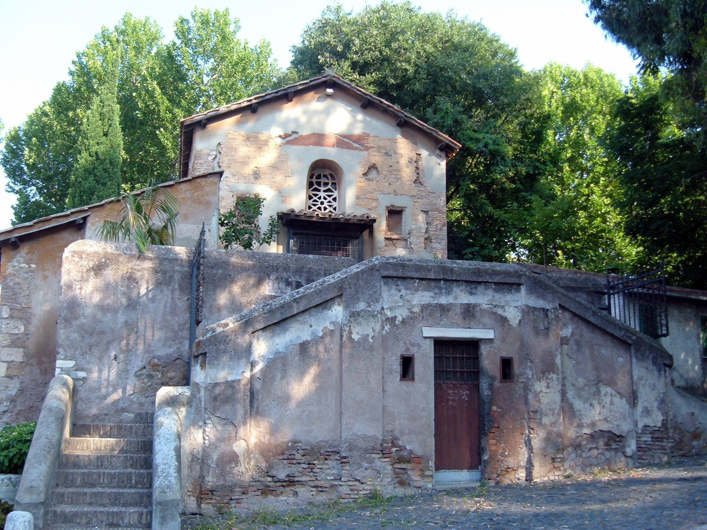 Chiesa di Santa Passera, a Roma, nel quartiere Portuense.